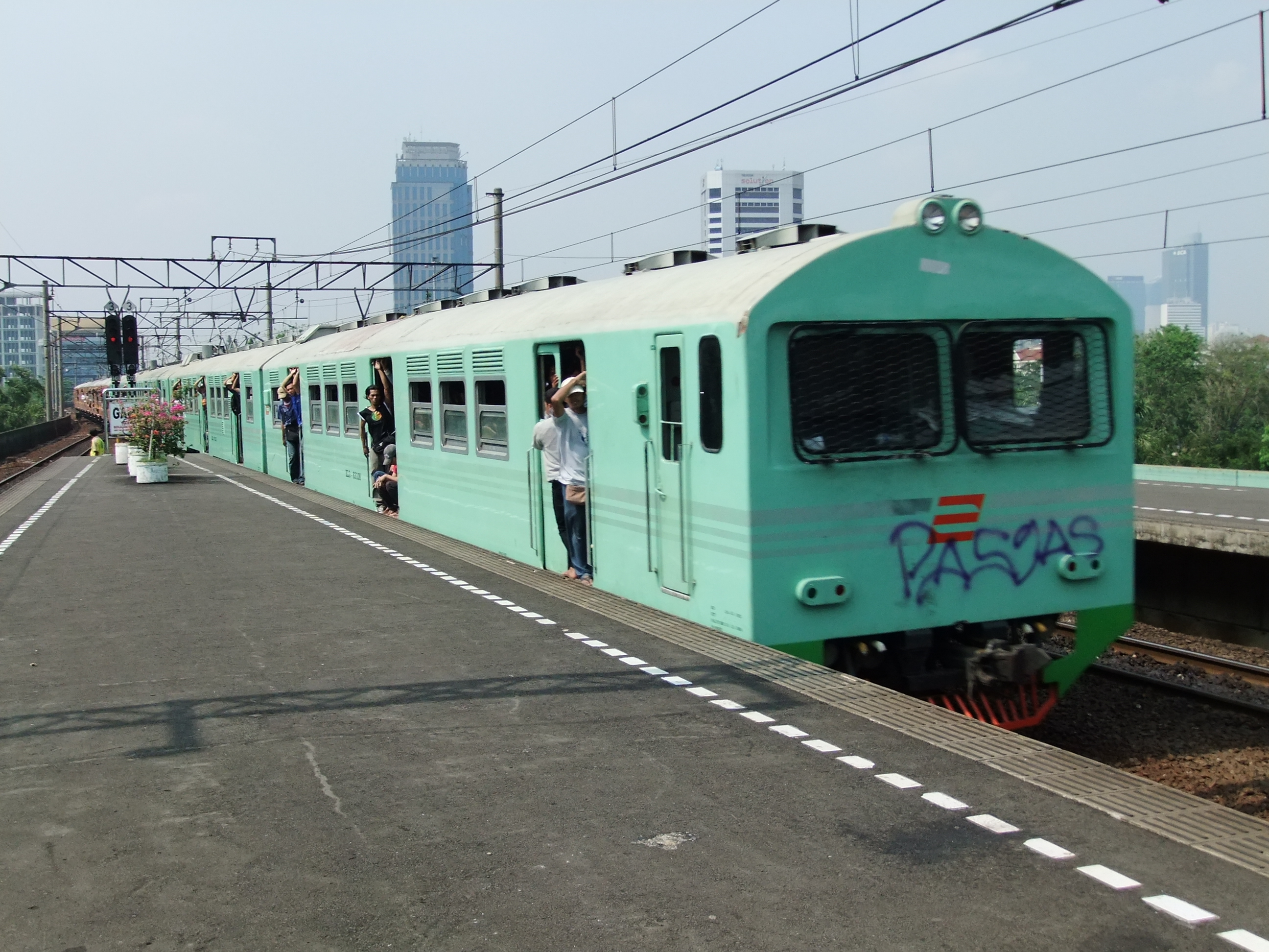 Kereta kelas ekonomi, Stasiun Gambir